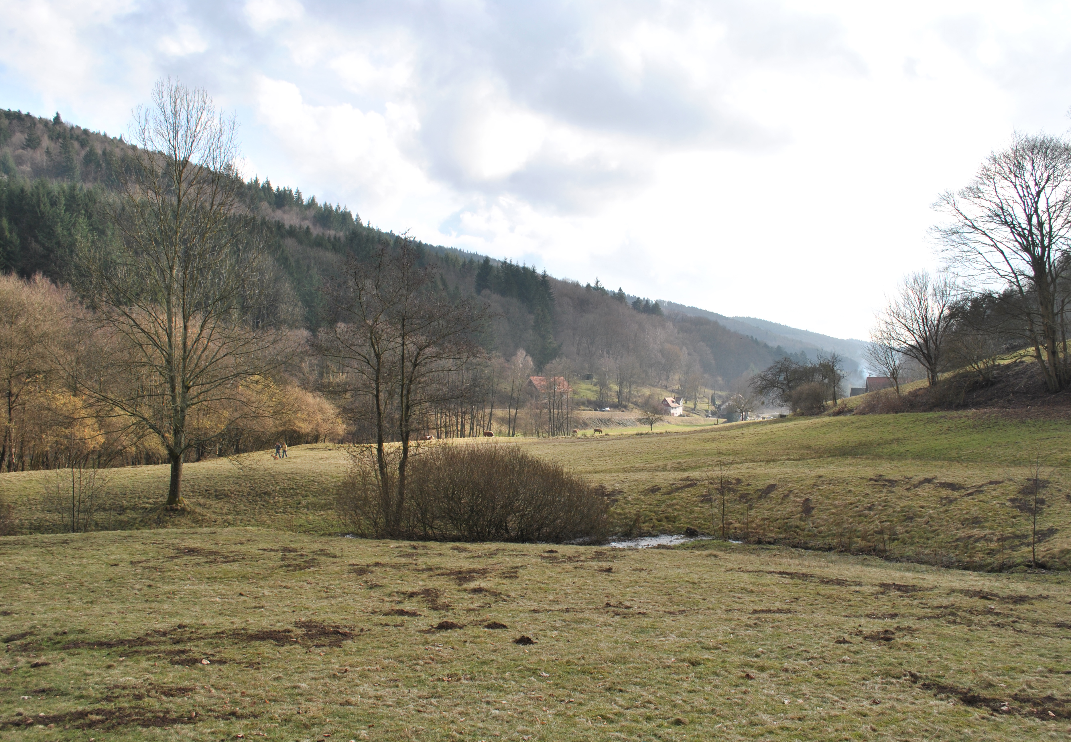 Noerdliches Ende des Eiterbachtals